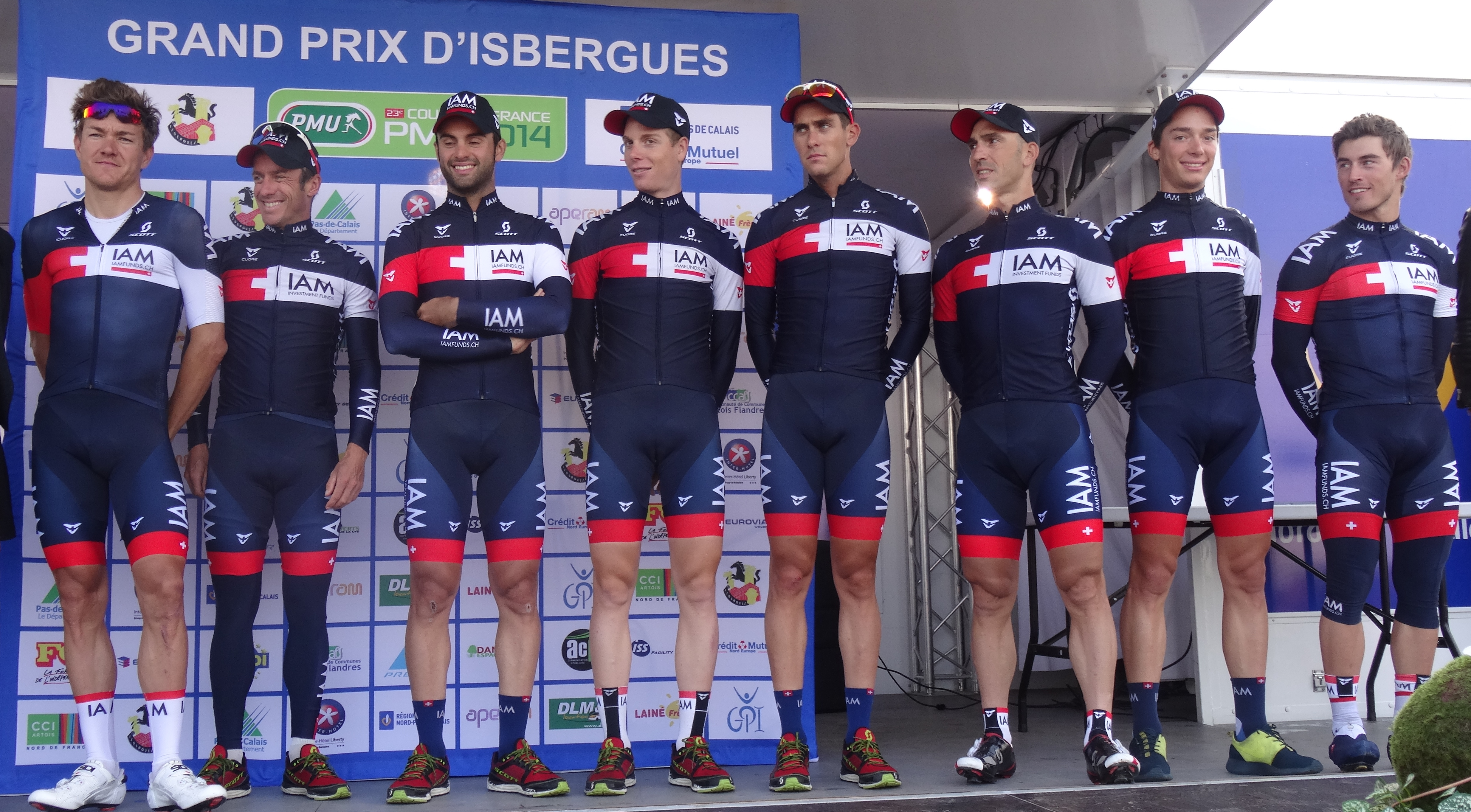 Reportage réalisé le dimanche 21 septembre à l'occasion du départ et de l'arrivée du Grand Prix d'Isbergues 2014 à Isbergues, Nord-Pas-de-Calais, France.